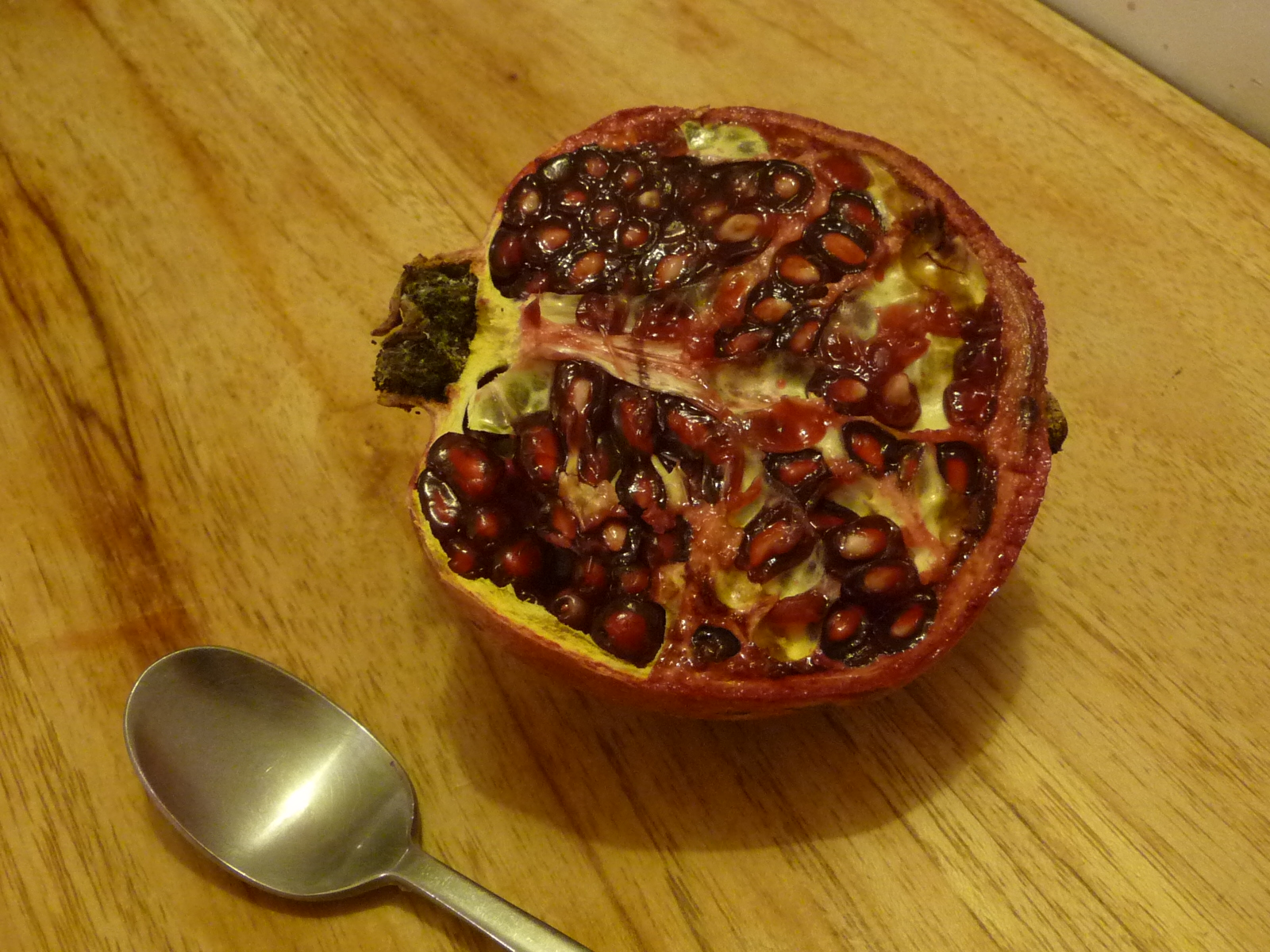 Moitié de grenade (avec cuillère pour marquer l'échelle)